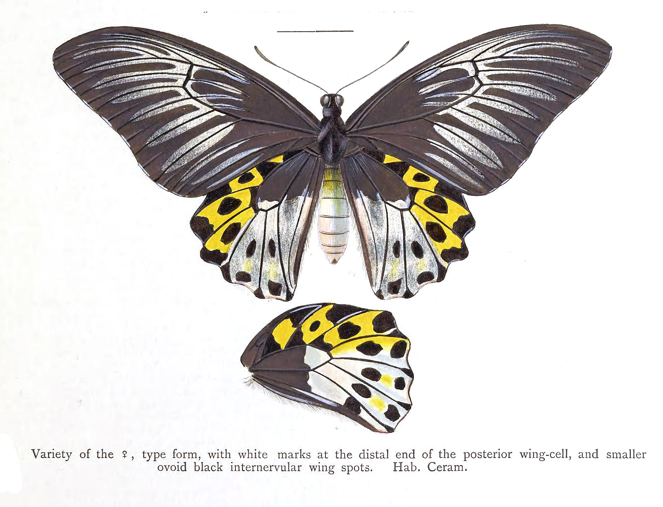 Troides hippolytus